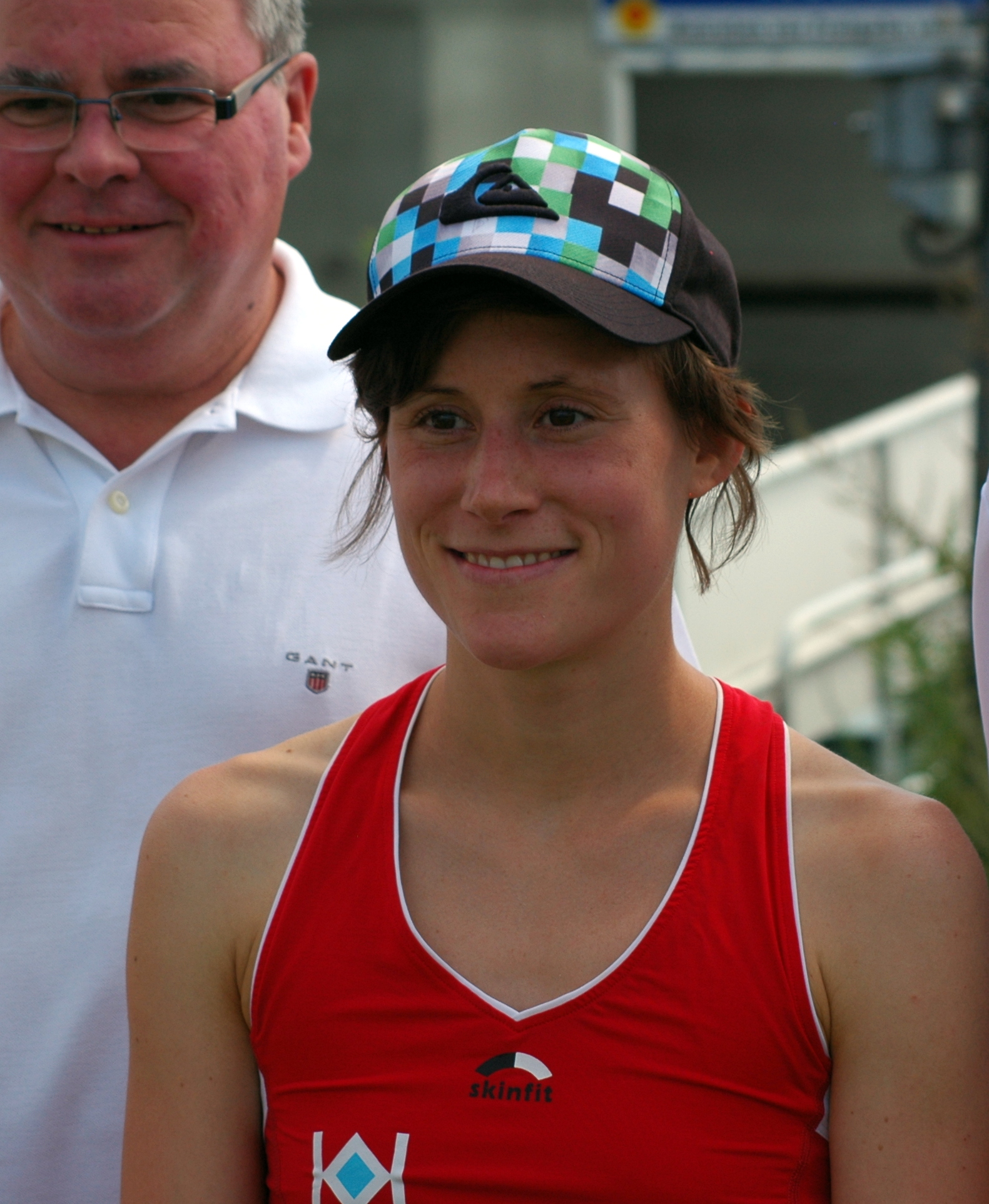 HeidelbergMan 2015 - Lena Berlinger